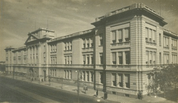 Vista de la Escuela Primaria N°21 Carlos Pellegrini, en la calle Entre Ríos 1341, San Cristóbal. Edificio inaugurado en 1922. Buenos Aires, Argentina ([1]).